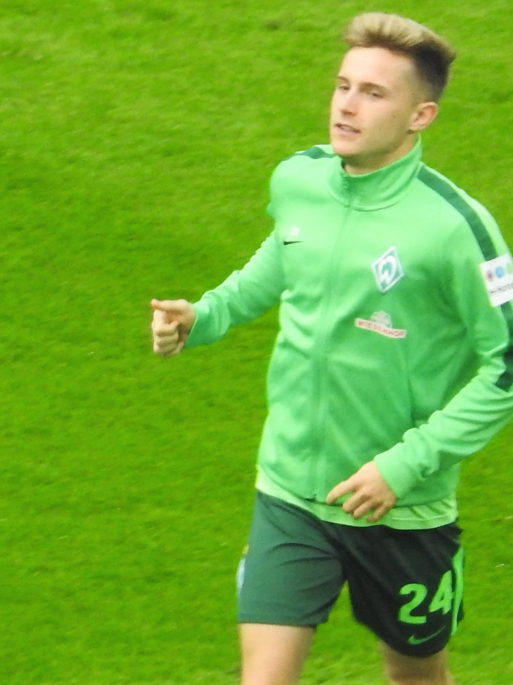 Johannes Eggestein, Werder Bremen